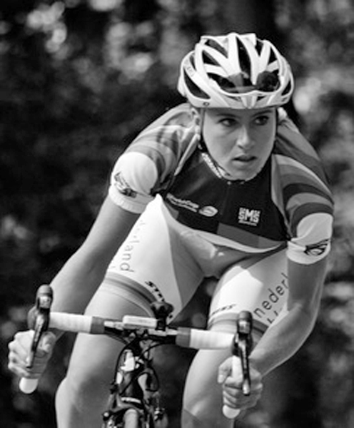 Annemiek van Vleuten wereldbeker winnares 2011